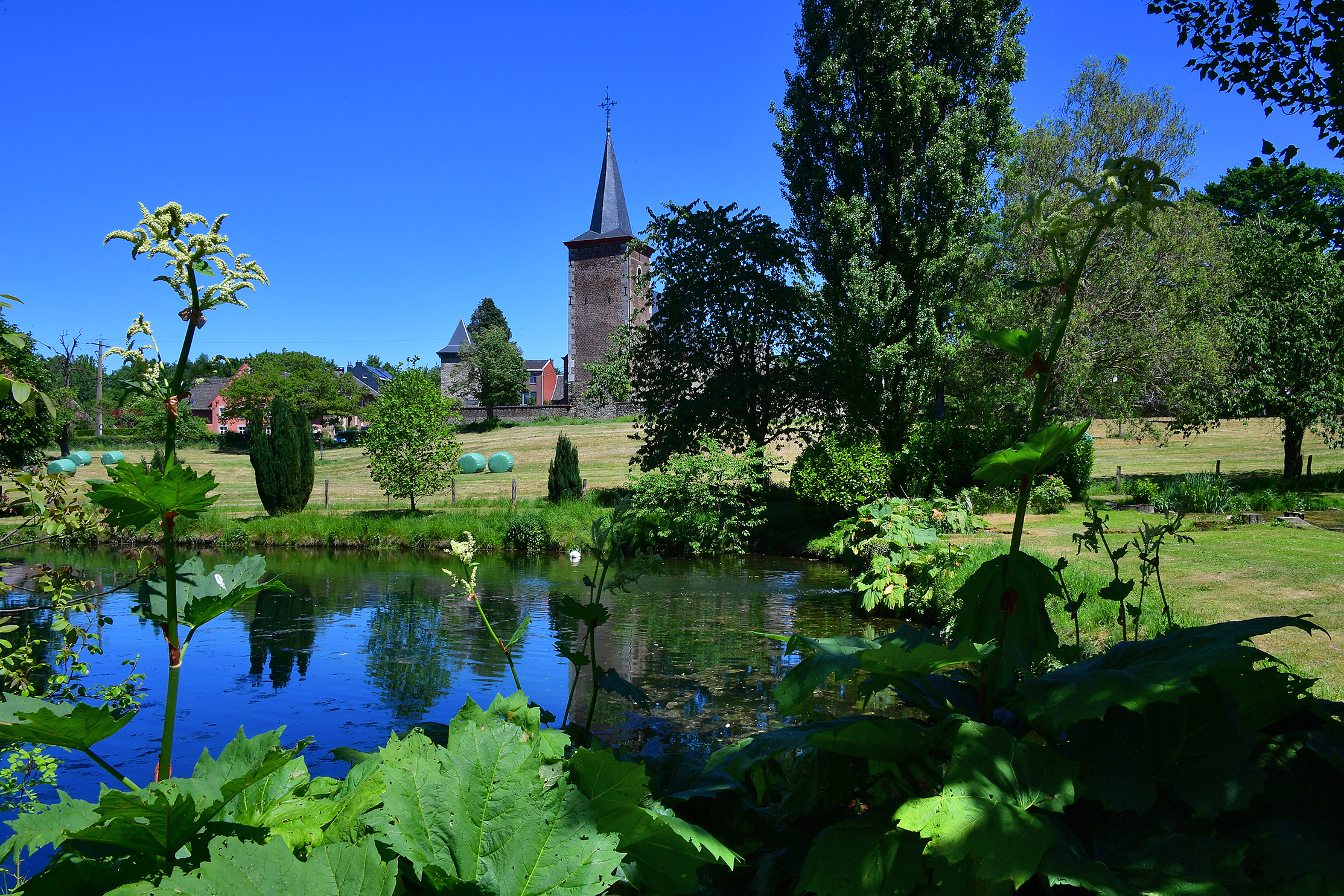 Sint-Pieters-Stoelkerk fotografiert von der Fischzucht der Commanderie